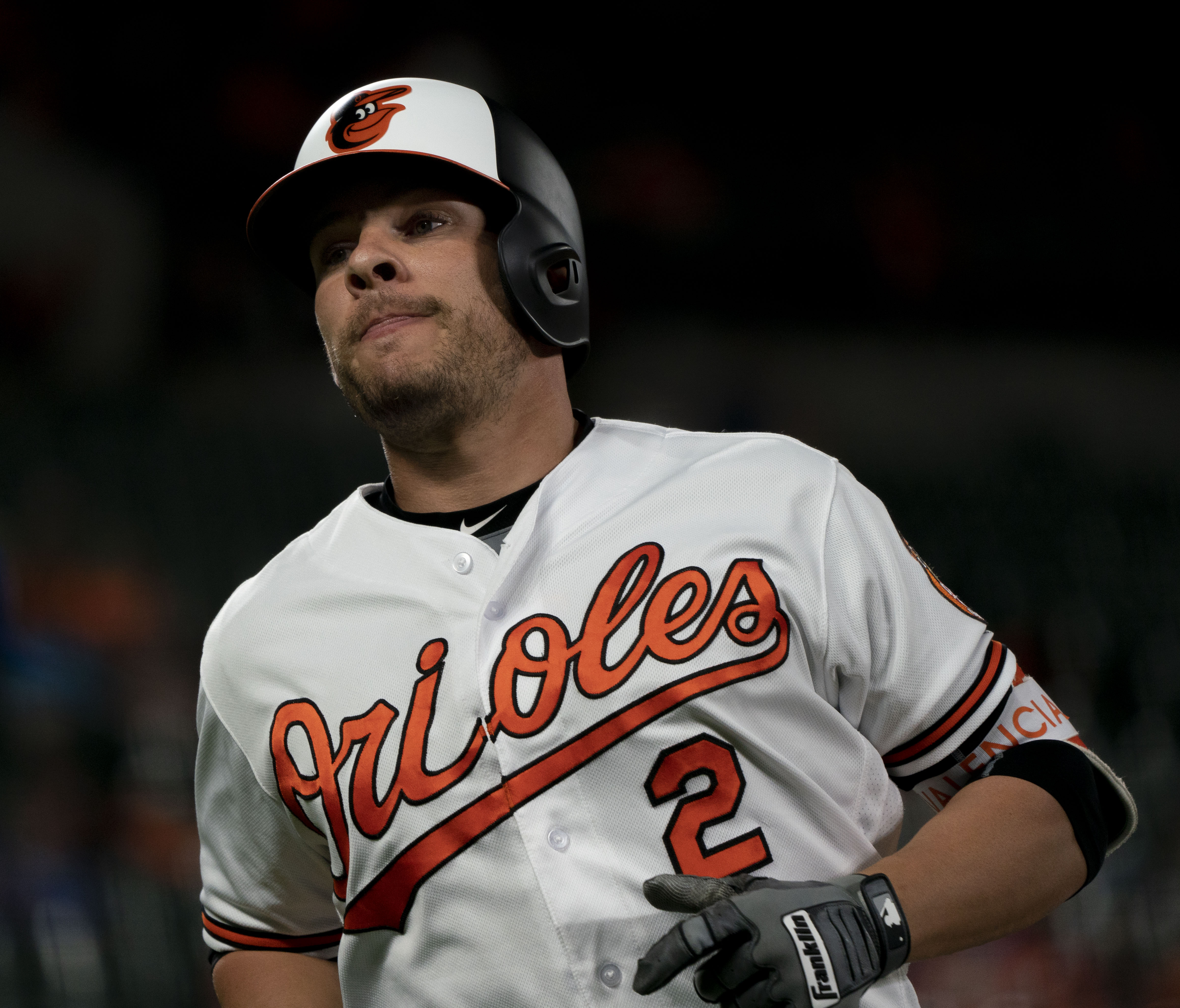 Royals at Orioles 5/9/18